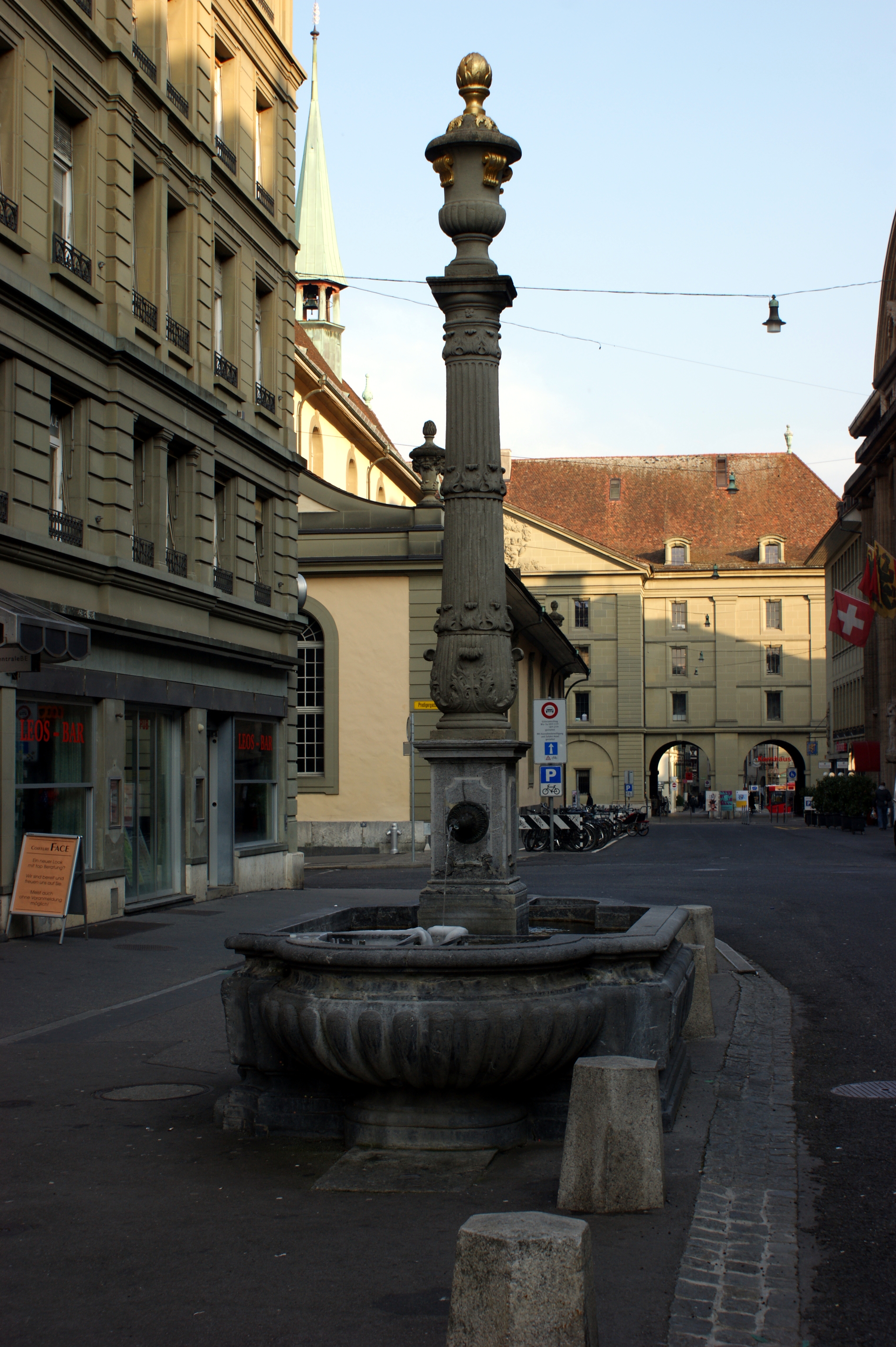 Lindenbrunnen mit teilweise sichtbarer Französischer Kirche und Durchgang Kornhaus im Hintergrund